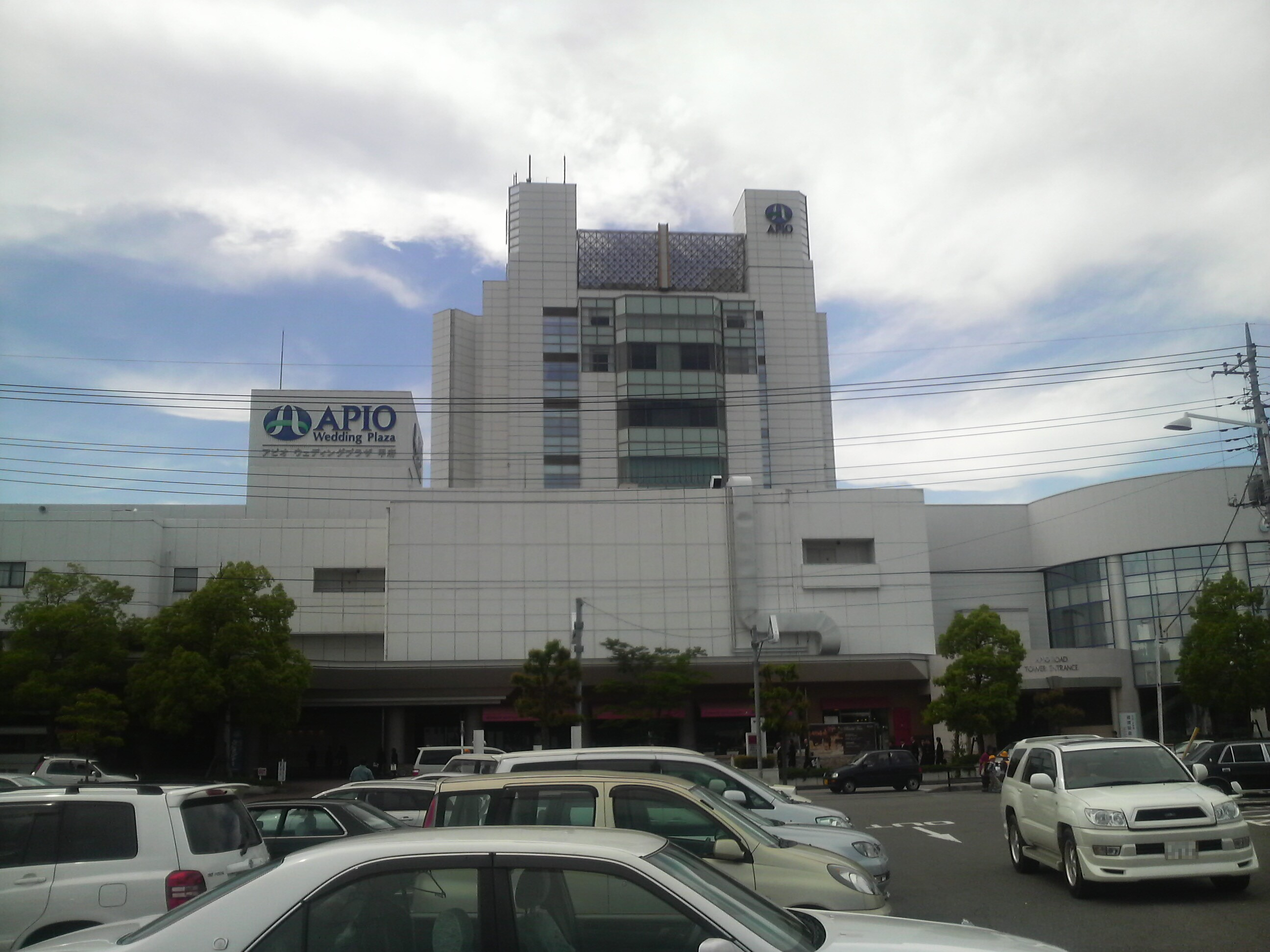 アピオ甲府タワー